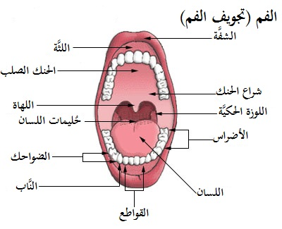 رسمٌ بياني لِمُكوِّنات تجويف الفم.